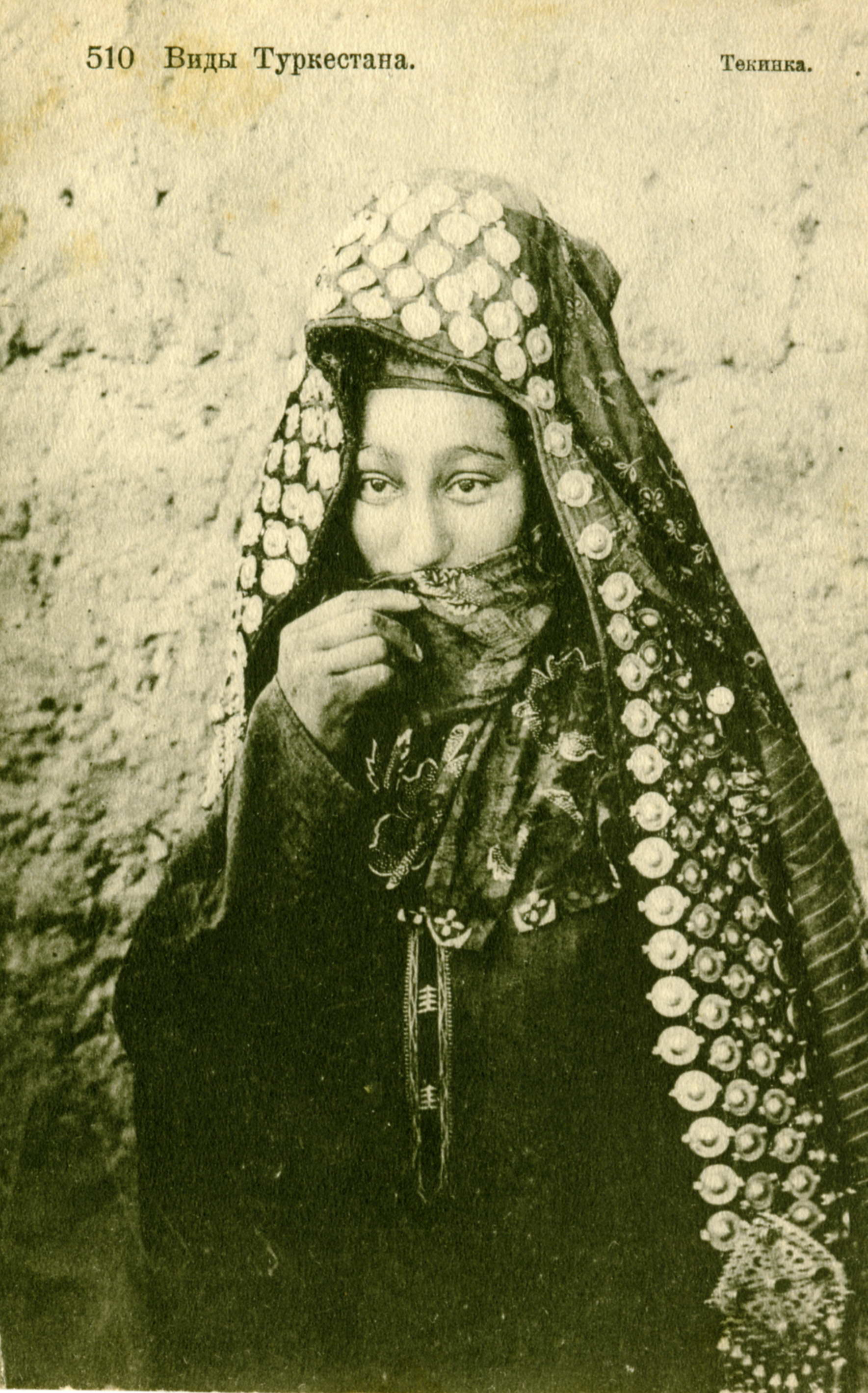 Туркменка Текинка в традиционной одежде, начало XX века.